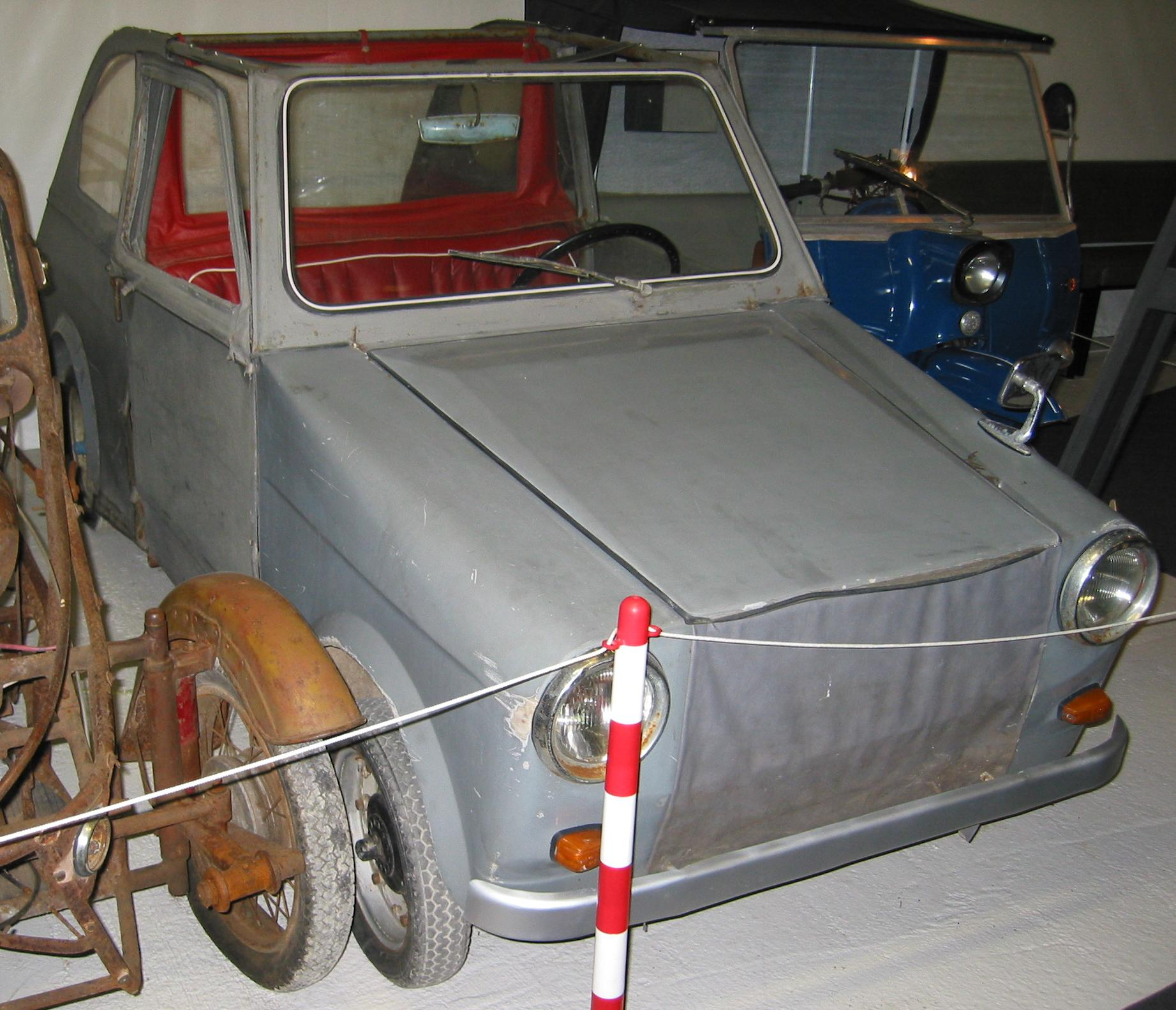 Velorex von 1972